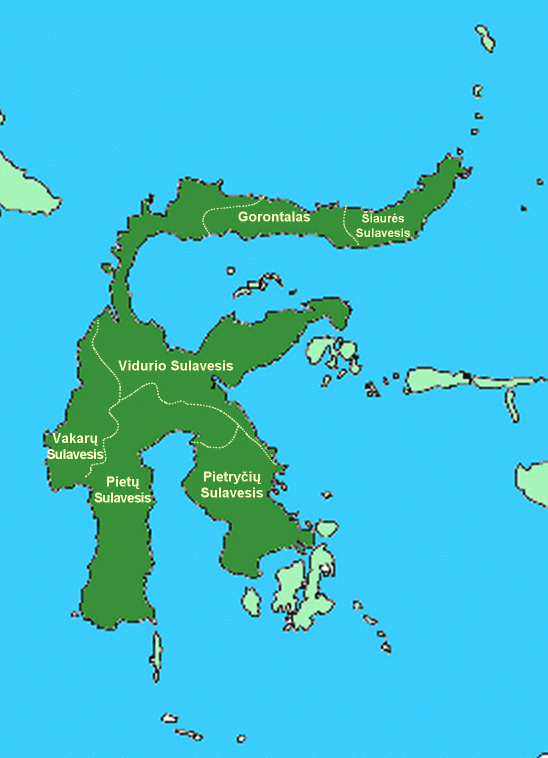 Carte administrative de Célèbes